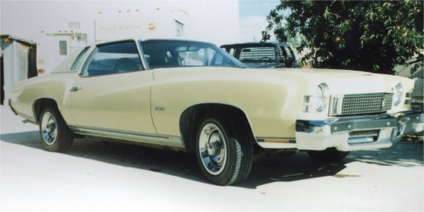 1973 Chevrolet Monte Carlo